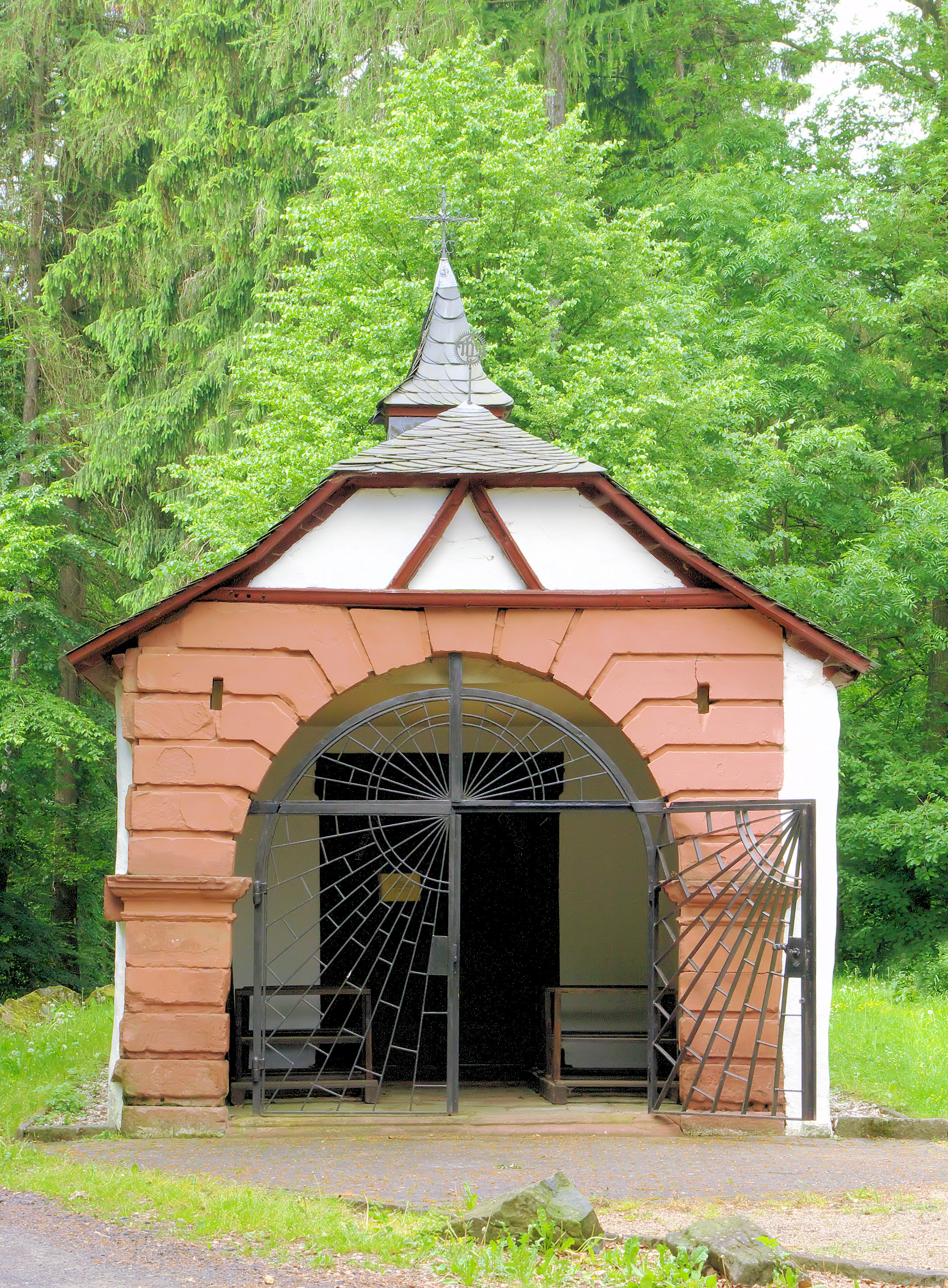 Die Schutzengelkapell von Aremberg